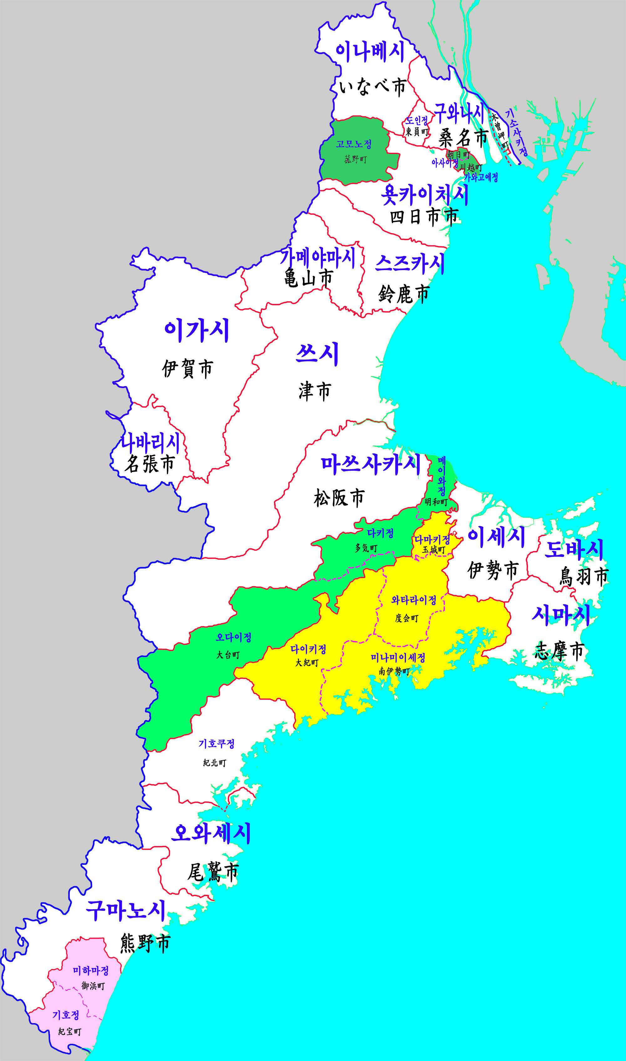 미에현 행정구역